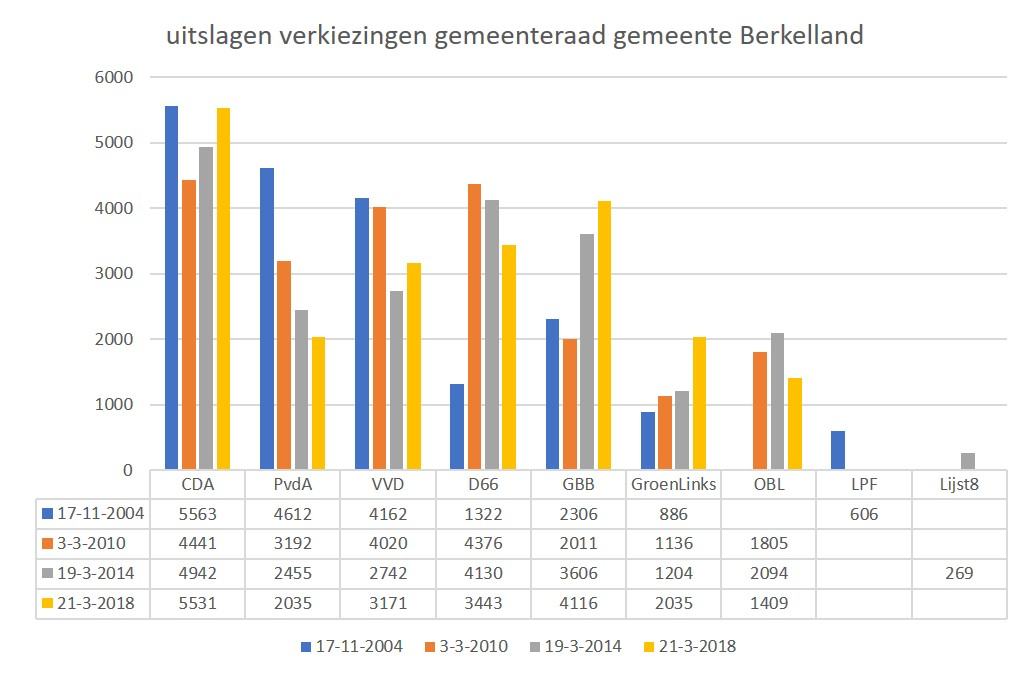 overzicht van de verkiezingsuitslagen van de gemeenteraadsverkiezingen in 2004, 2010, 2014 en 2018